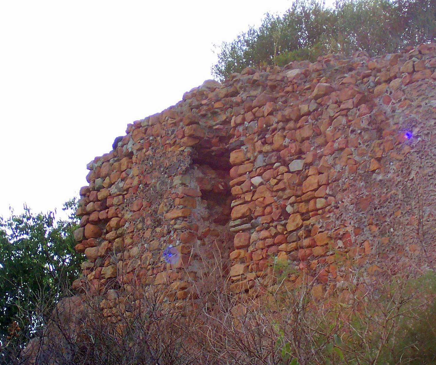 Retro-facciata della vecchia chiesa di Sant'Elena, Lotzorai(Og)